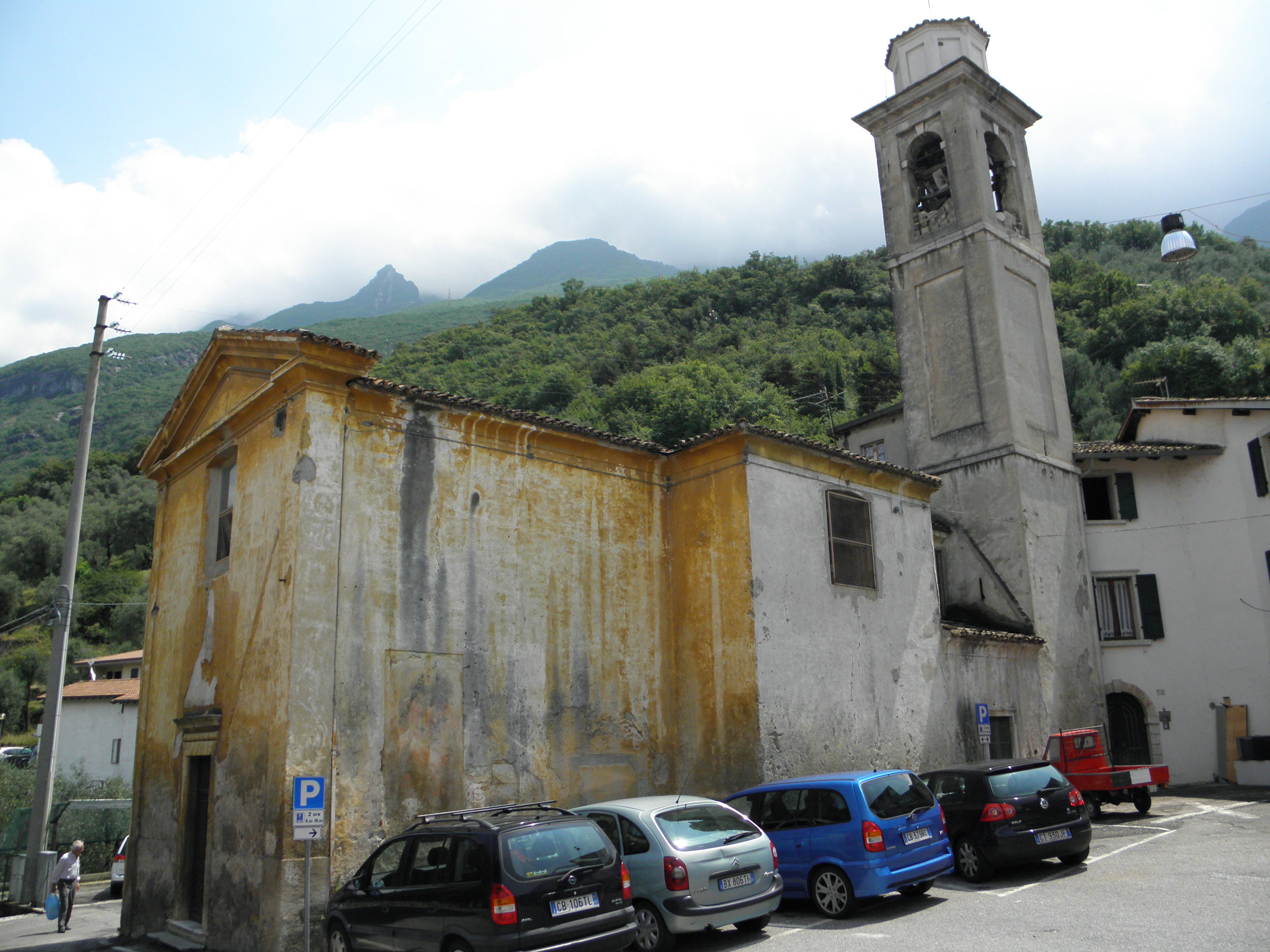 Cassone, frazione di Malcesine: l'Oratorio dei Santi Benigno e Caro, esterno.